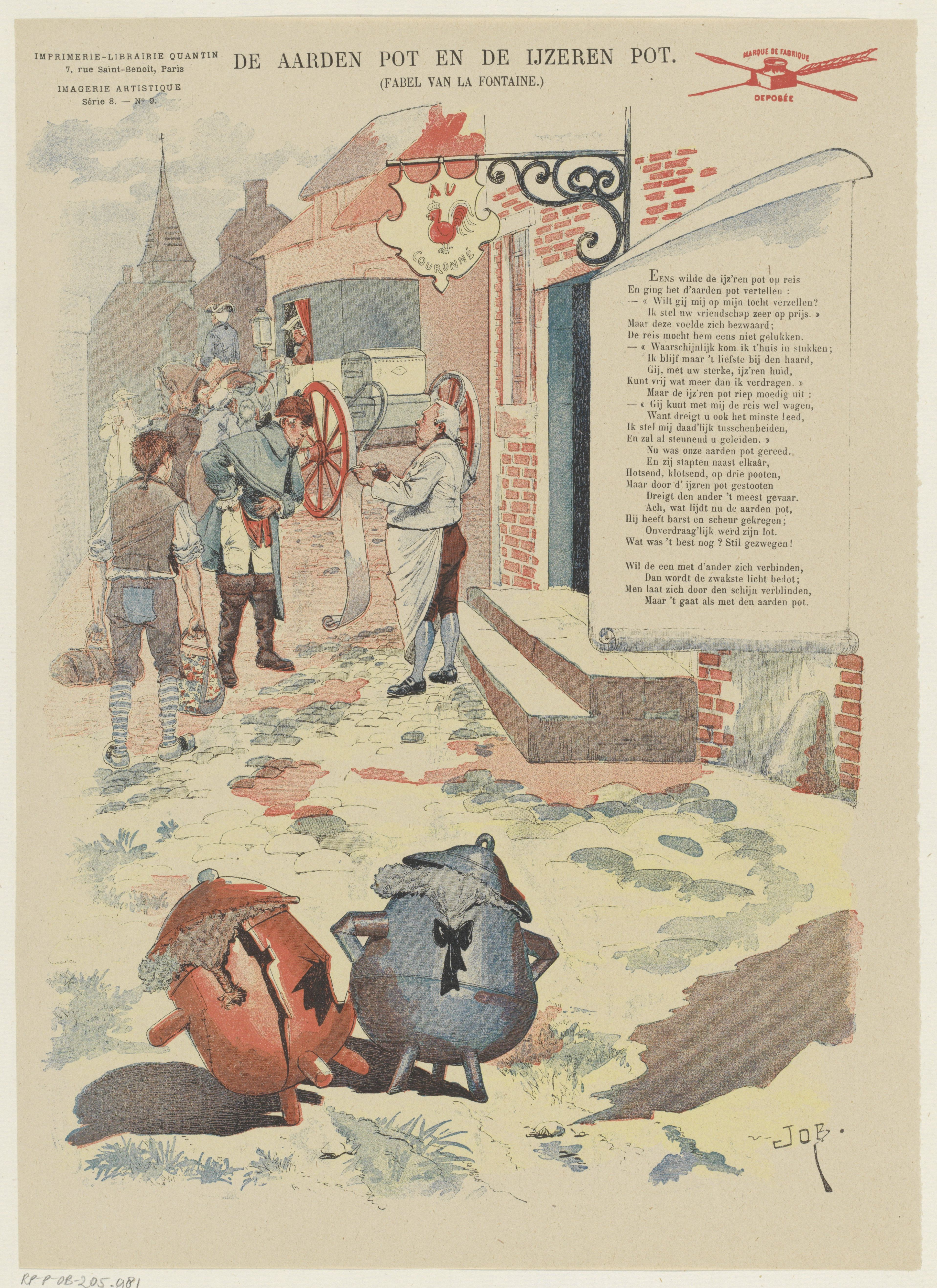 IdentificatieTitel(s): De aarden pot en de ijzeren pot (titel op object)Fabel van La Fontaine (serietitel op object)Imagerie Artistique / Série 8 (serietitel op object)Objecttype: prent volksprent Serienummer: 9/20Objectnummer: RP-P-OB-205.981Opschriften / Merken: verzamelaarsmerk, verso, gestempeld: Lugt 2760octrooivermelding, recto rechtsboven, gestempeld: ‘marque de fabrique / deposée’, rode stempel met inktpot, pen en schrijfveerOmschrijving: Blad met een grote voorstelling uit de fabel van Jean de La Fontaine, van de aarden pot en de ijzeren pot. Rechtsboven een tekstblok met versregels. Genummerd linksboven: Série 8. - No. 8.VervaardigingVervaardiger: ontwerper: Job (vermeld op object)prentmaker: Job (vermeld op object)uitgever: Albert Quantin (vermeld op object)Plaats vervaardiging: ParijsDatering: 1876 - 1890 en/of 1890Fysieke kenmerken: kleurenlithografie en tekst in boekdrukMateriaal: papier Techniek: kleurenlithografie (procedé) / boekdrukAfmetingen: blad: h 368 mm × b 266 mmOnderwerpWat: fabelskitchen-utensils: potVerwerving en rechtenCredit line: Schenking van de heer F.G. Waller, AmsterdamVerwerving: schenking 1923Copyright: Publiek domein